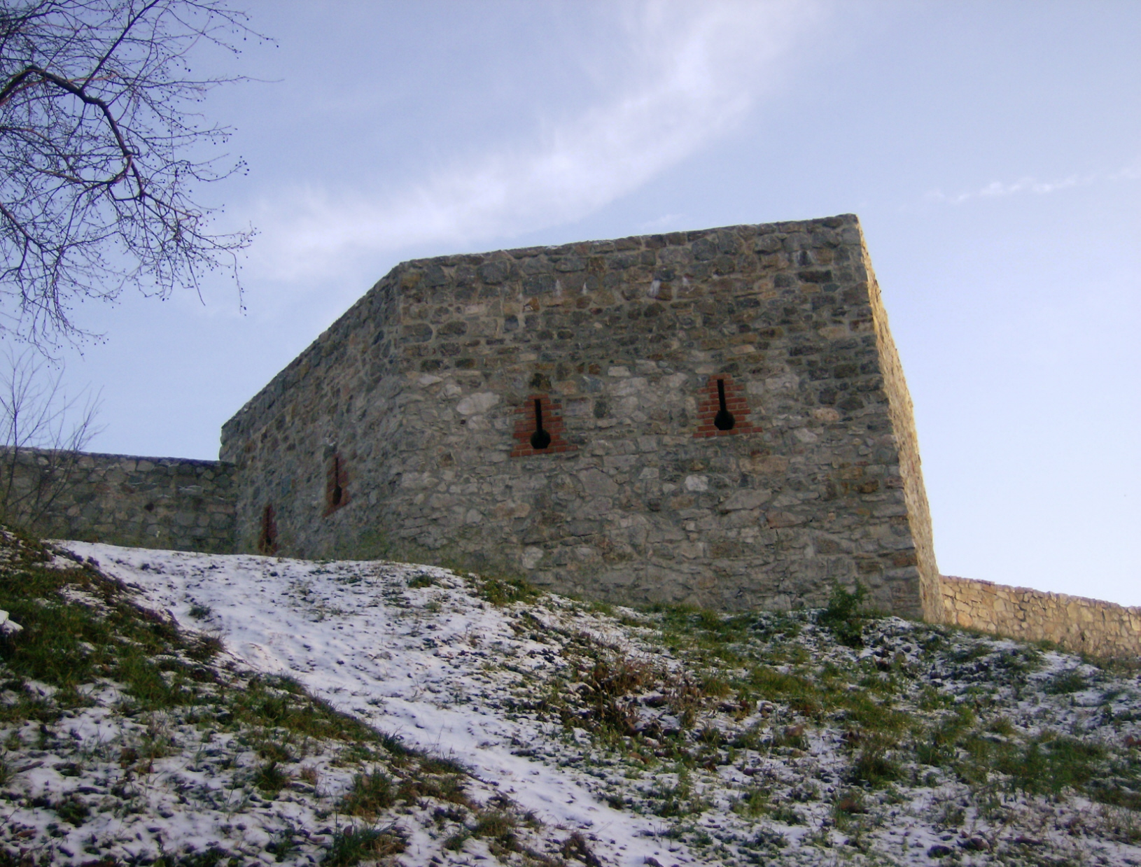 Wzgórze Zamkowe w Kielcach, baszta obronna w murach okalających Pałac Biskupów Krakowskich.